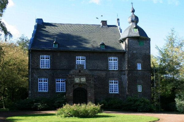 Denkmal Nr. 3 in Willich-Anrath